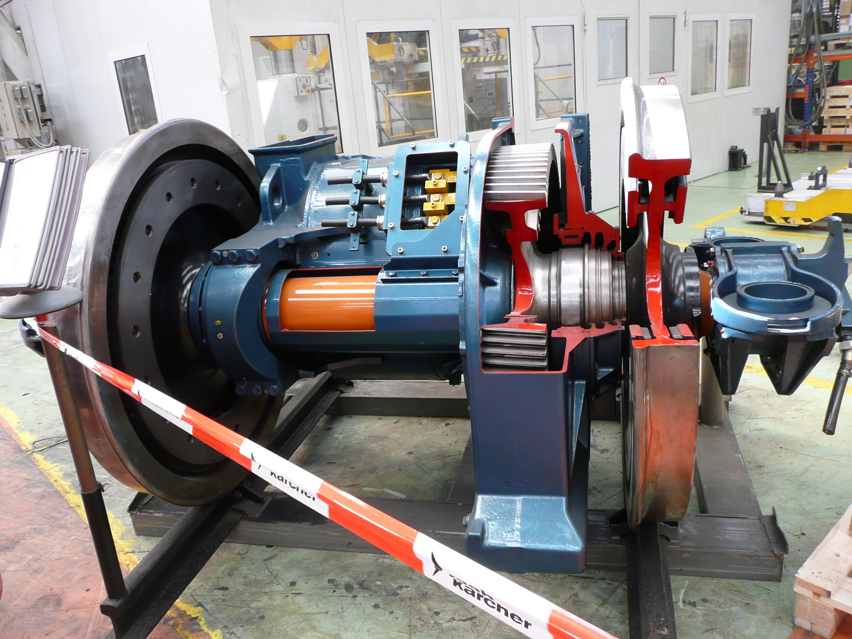 Schnittmodell von einem Antrieb der BR 152 im AW Dessau